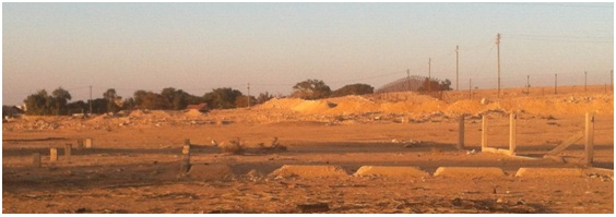 שרידי דיר הכבשים מהיאחזות הנח"ל באשלים על רקע הישוב החדש